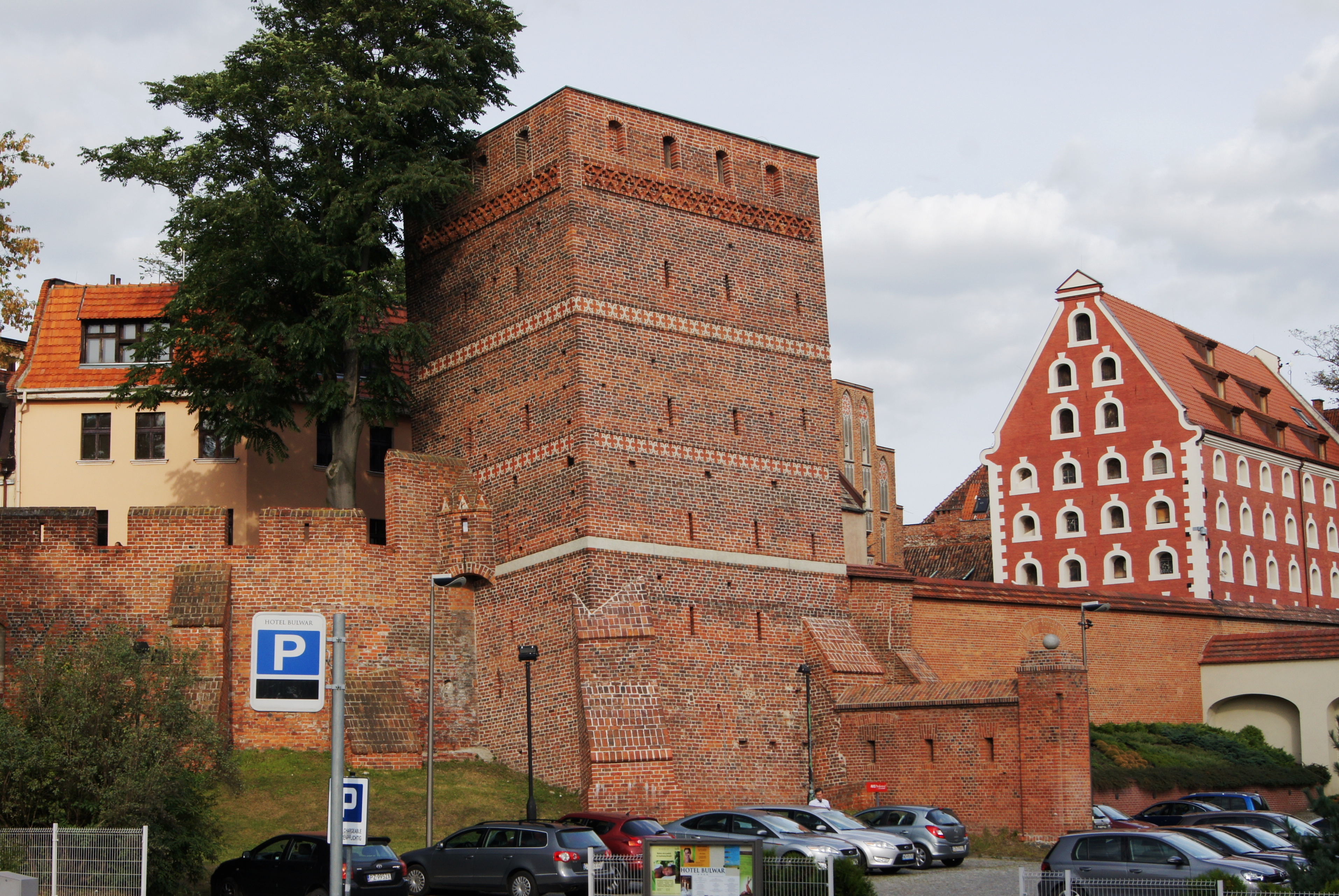 Toruń, ul. Pod Krzywą Wieżą 1 - "Krzywa Wieża" (zabytek nr rejestr. A/586)